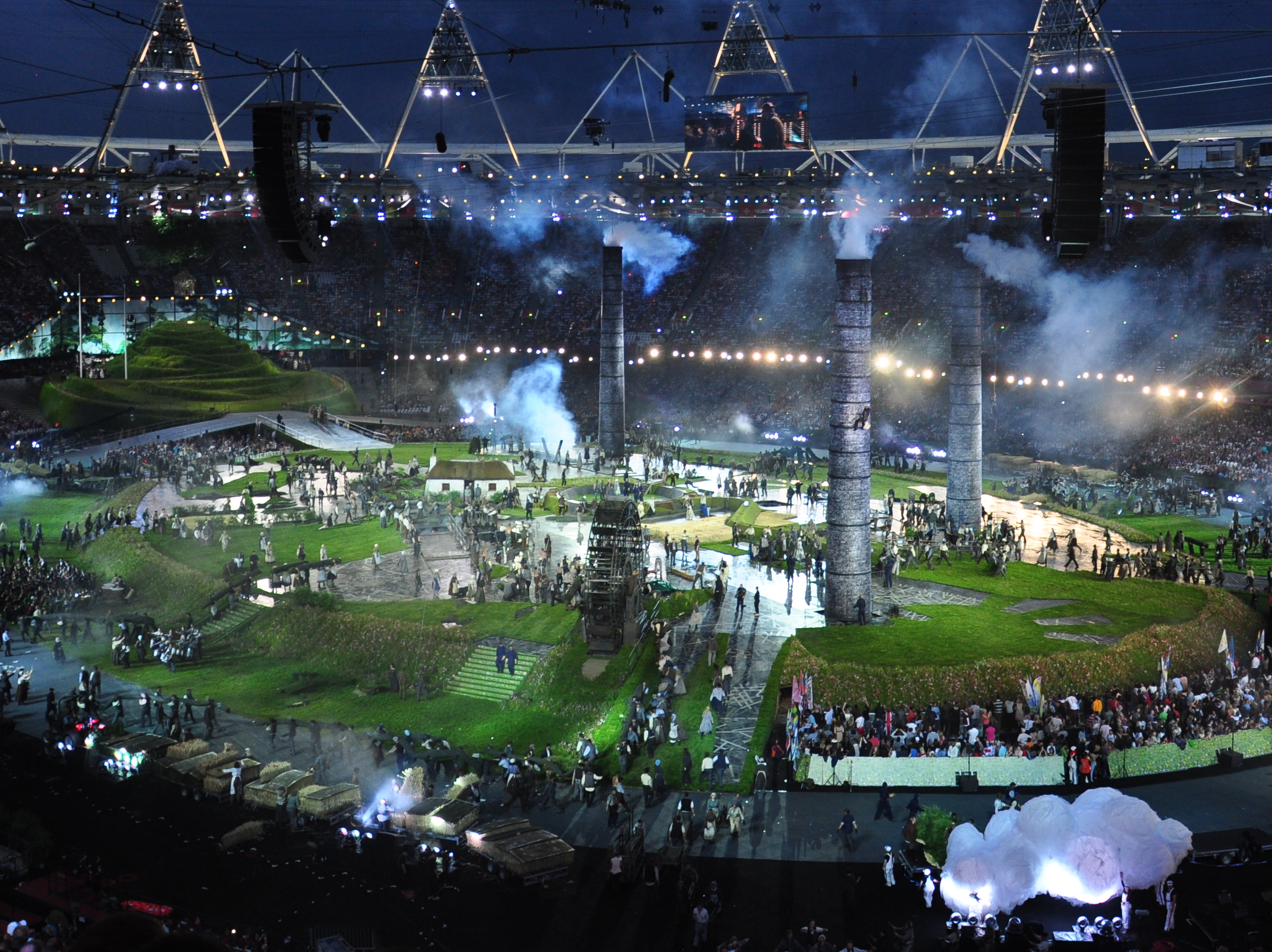 Pandomonium